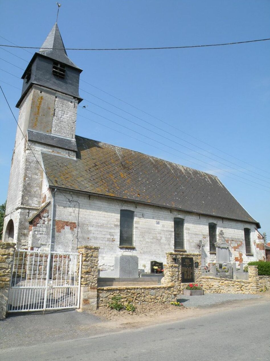 église Buneville